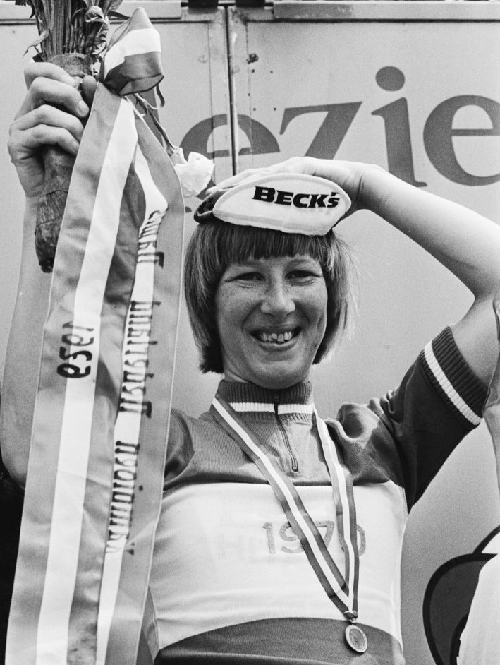 Nederlandse Kampioenschappen Wielrennen Dames 1979 in Geulle (Limburg). Tineke Fopma